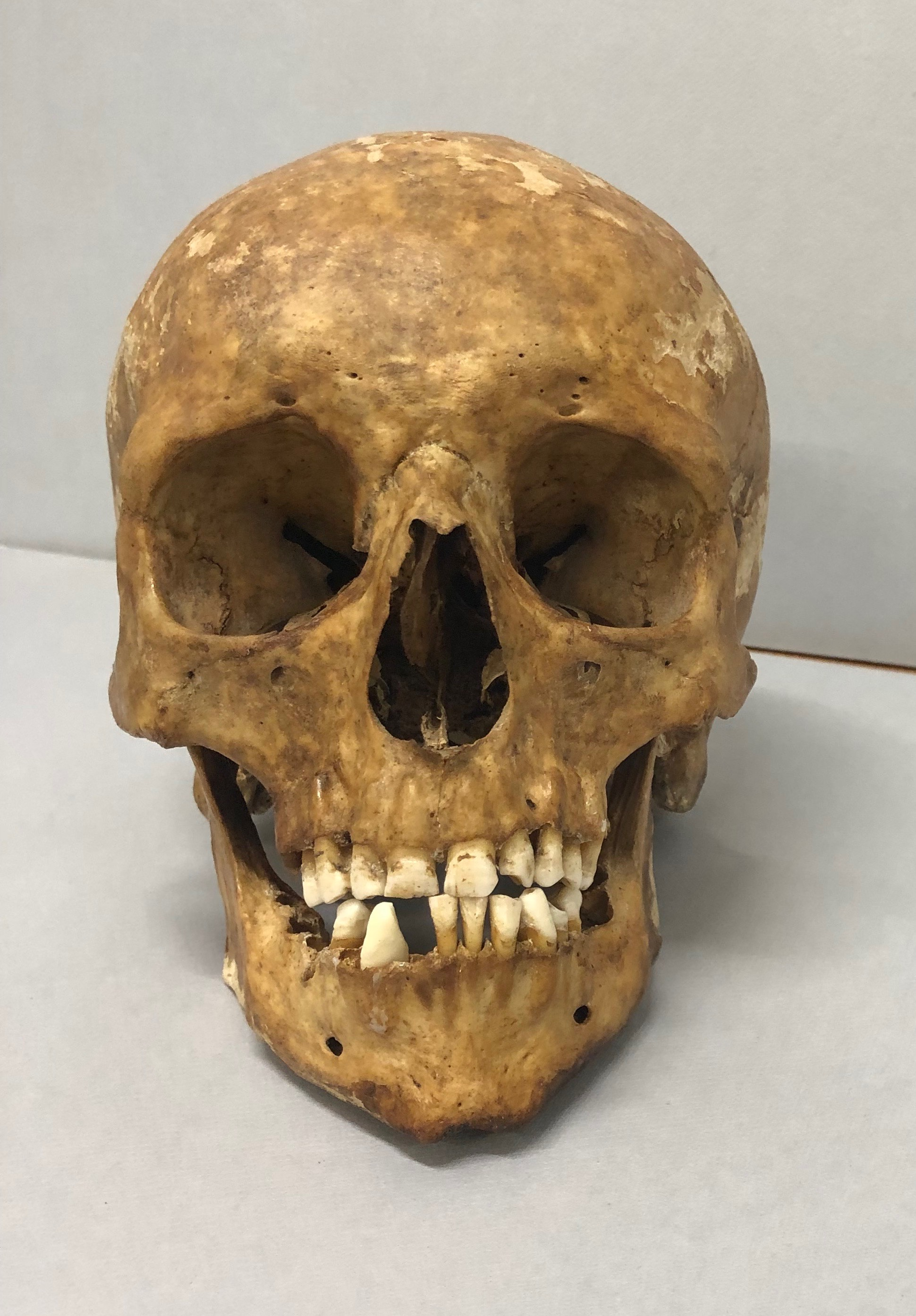 Theo der Pfeifenraucher Schädel frontal, Naturhistorisches Museum Basel